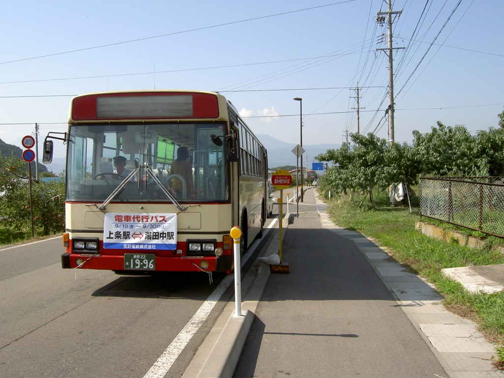 湯田中駅-上条駅電車代行バス（上条駅前にて）